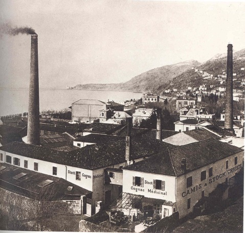 Immagine del vecchio stabilimento produttivo